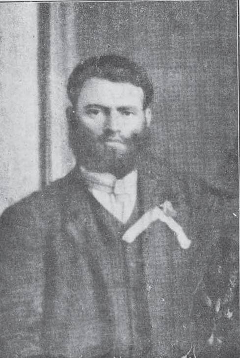 Hristo Arnaudov